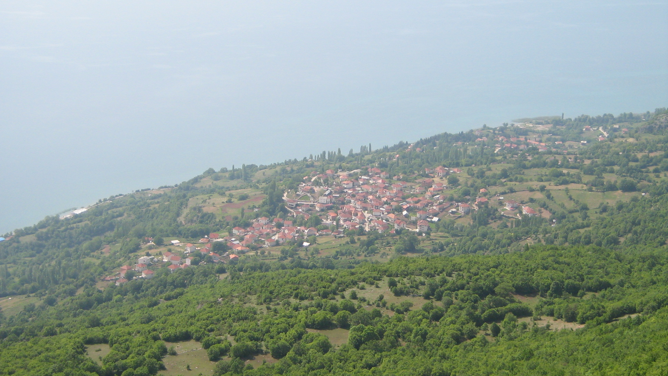 Елшани гледано од Часшкине